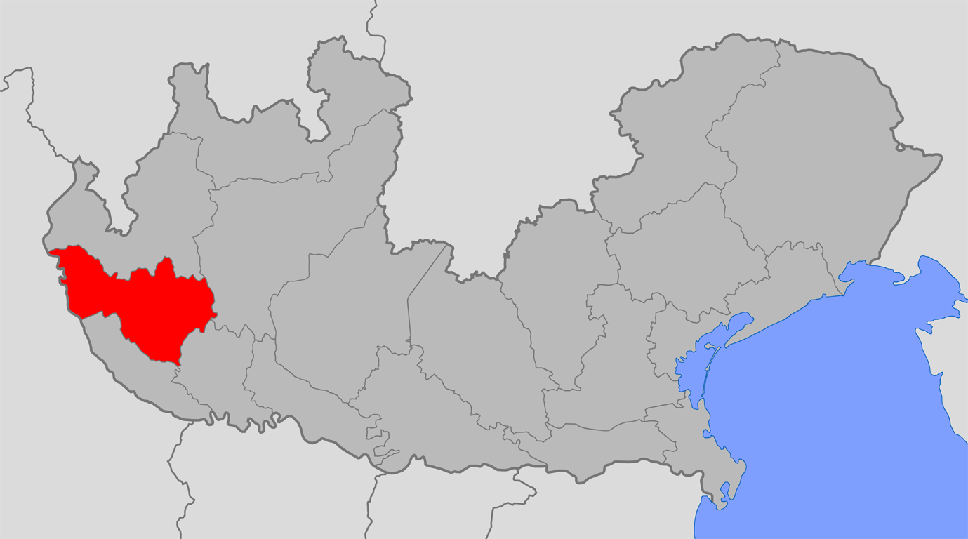 La provincia di Milano nel Regno Lombardo-Veneto (1816-1859)